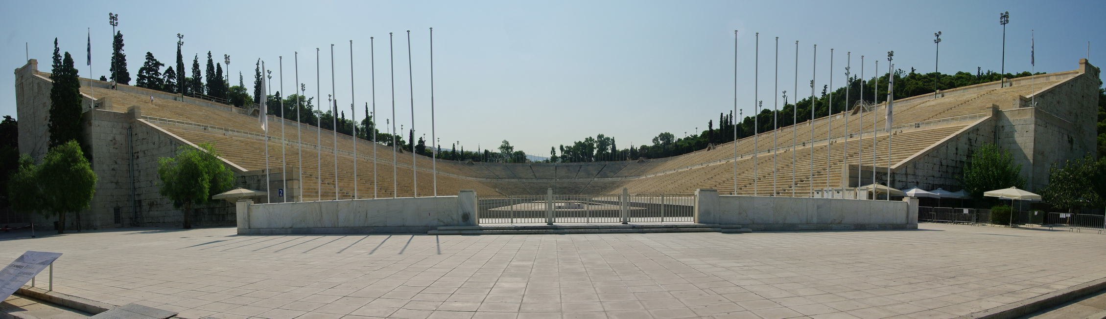 Altes Olympia-Stadion von 1896